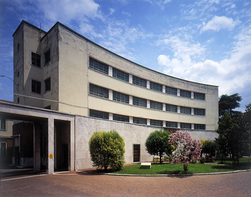 autoistazione sita